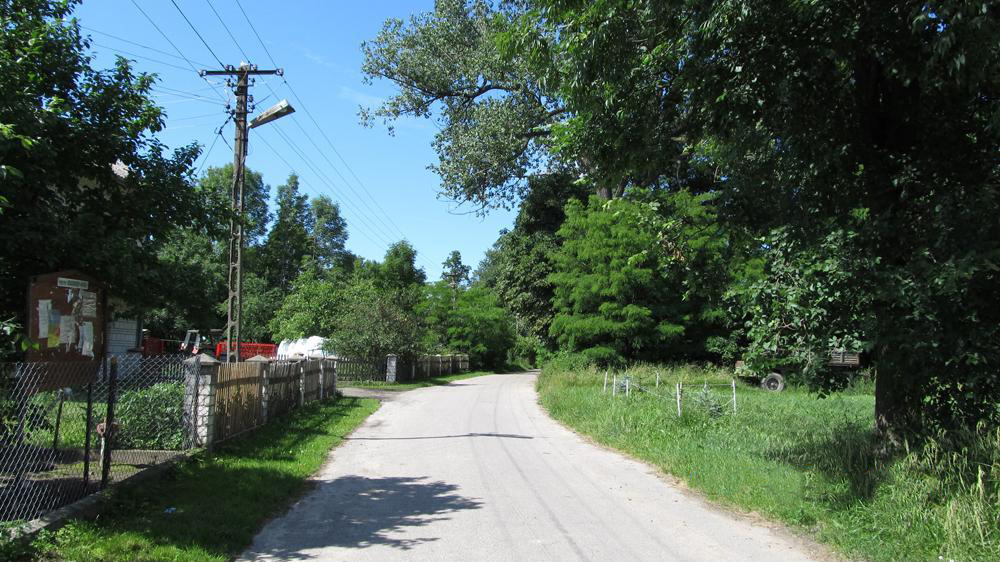 Krasnodęby-Rafały, widok od strony wsi Kożuchów